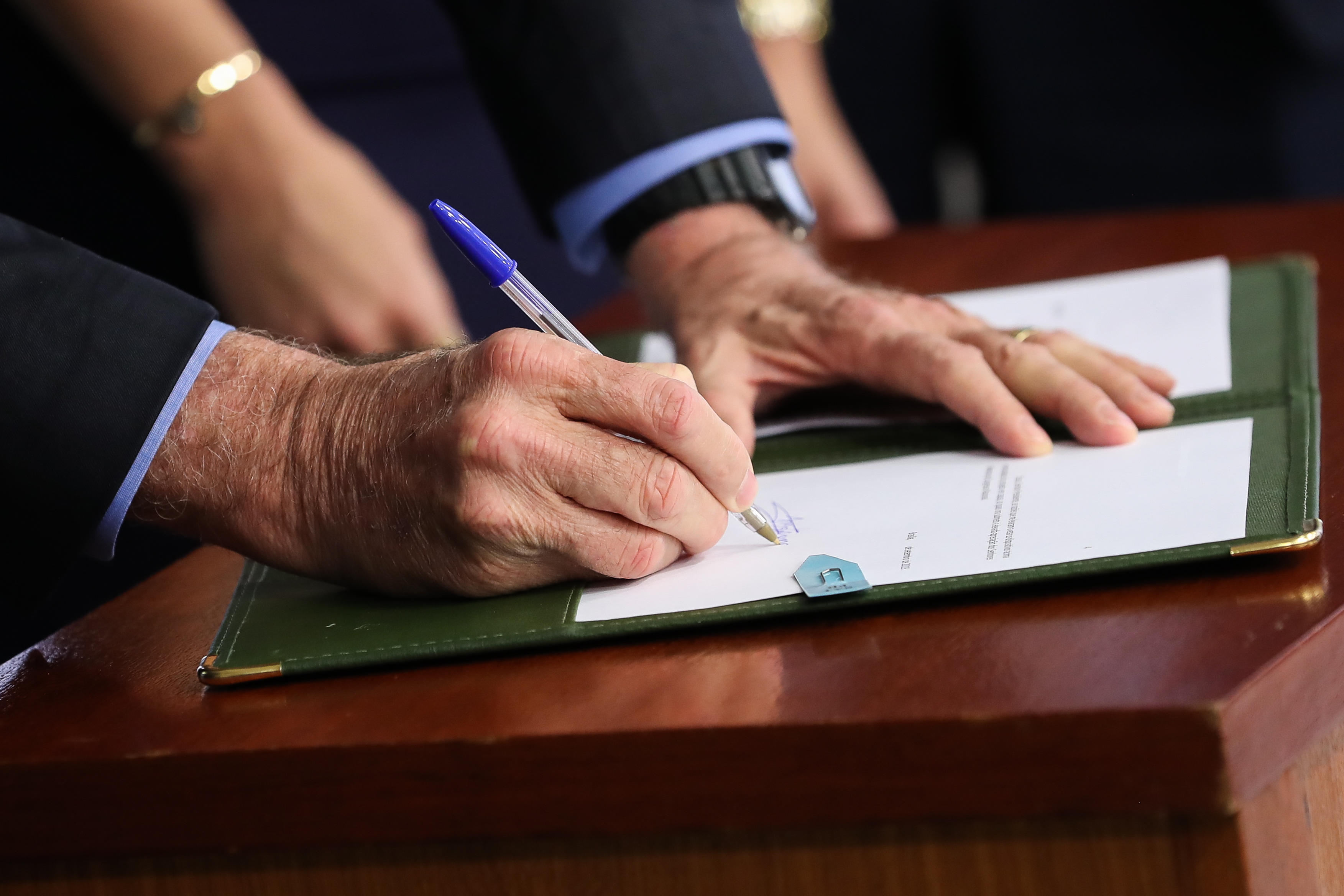 (Brasília - DF, 20/09/2019) O Presidente da República, Jair Bolsonaro, sanciona o Projeto de Lei de Conversão. (MP da Liberdade Econômica). Foto: Marcos Corrêa/PR